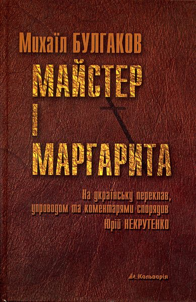 Обложка книги М. А. Булгакова "Майстер і Маргарита" в переводе на украинский язык Юрием Некрутенко